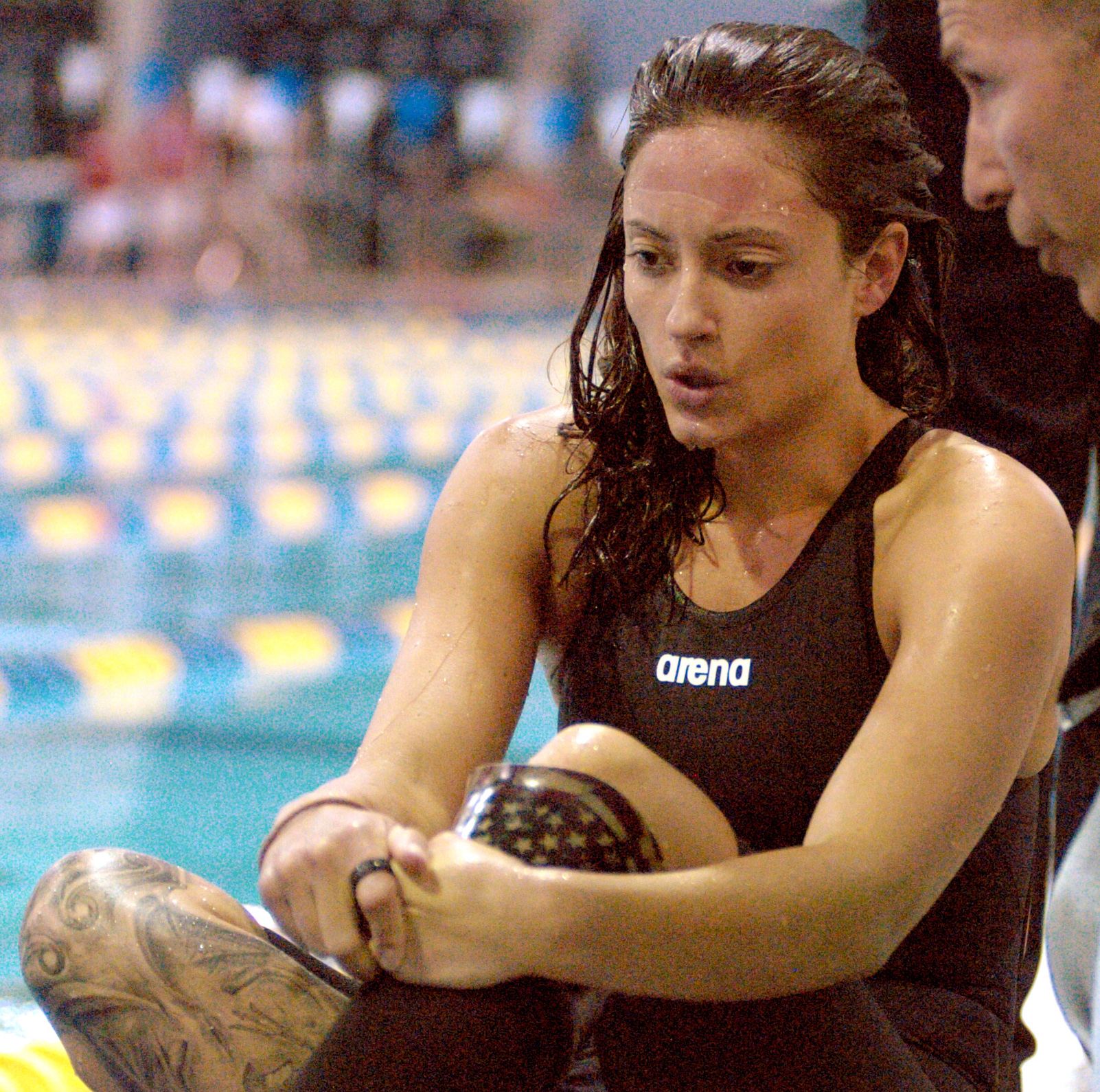 SGTMarksJasonBarber0045